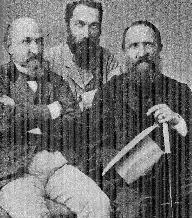 Bracia Kraszewscy - Lucjan, Kajetan i Józef, Drezno 1871